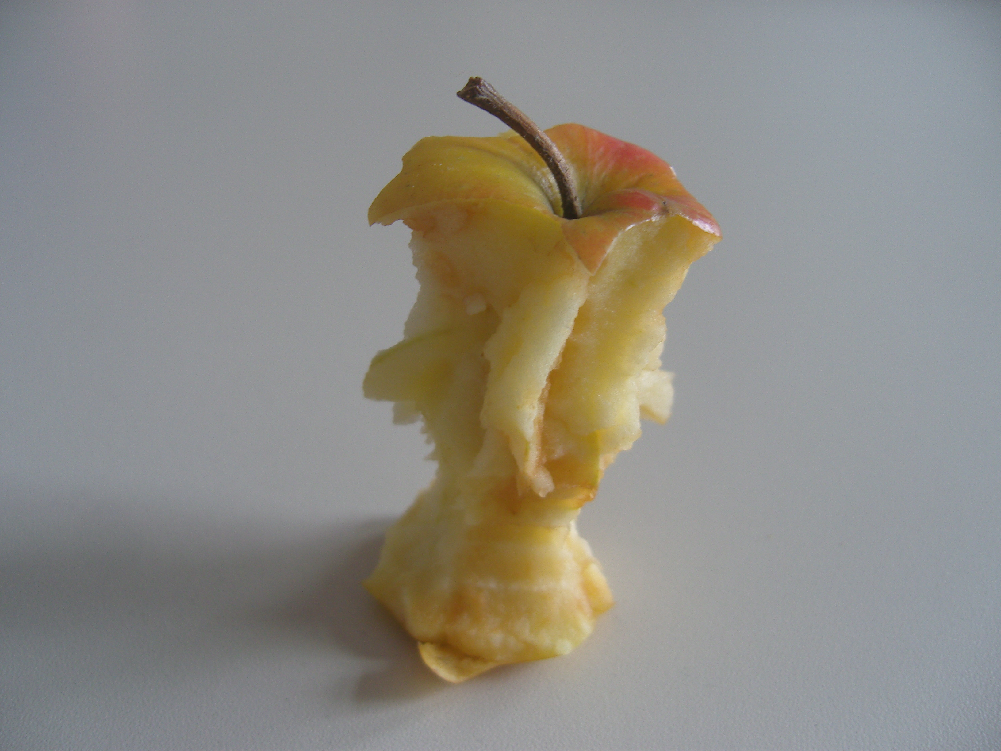 Apfelgriebsch